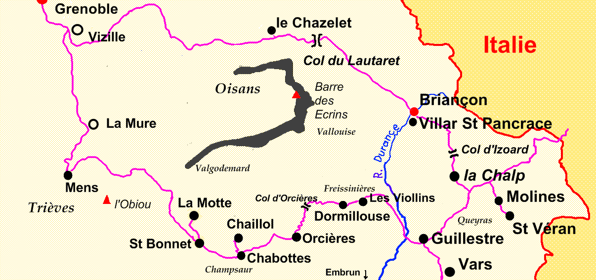 carte du champ de mission de Félix Neff, pasteur dans le département des hautes-Alpes.